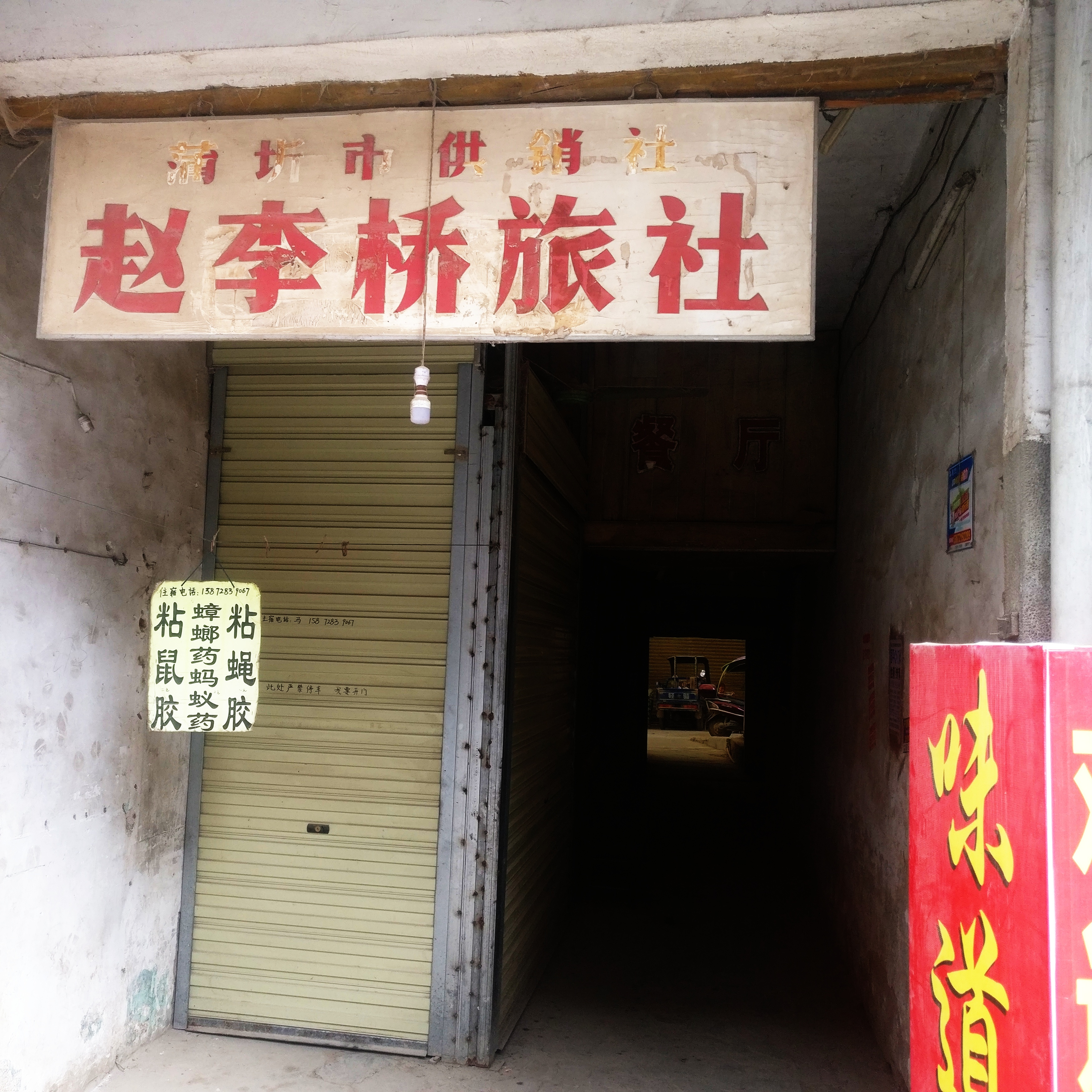 赵李桥旅舍，位于湖北省赤壁市赵李桥镇